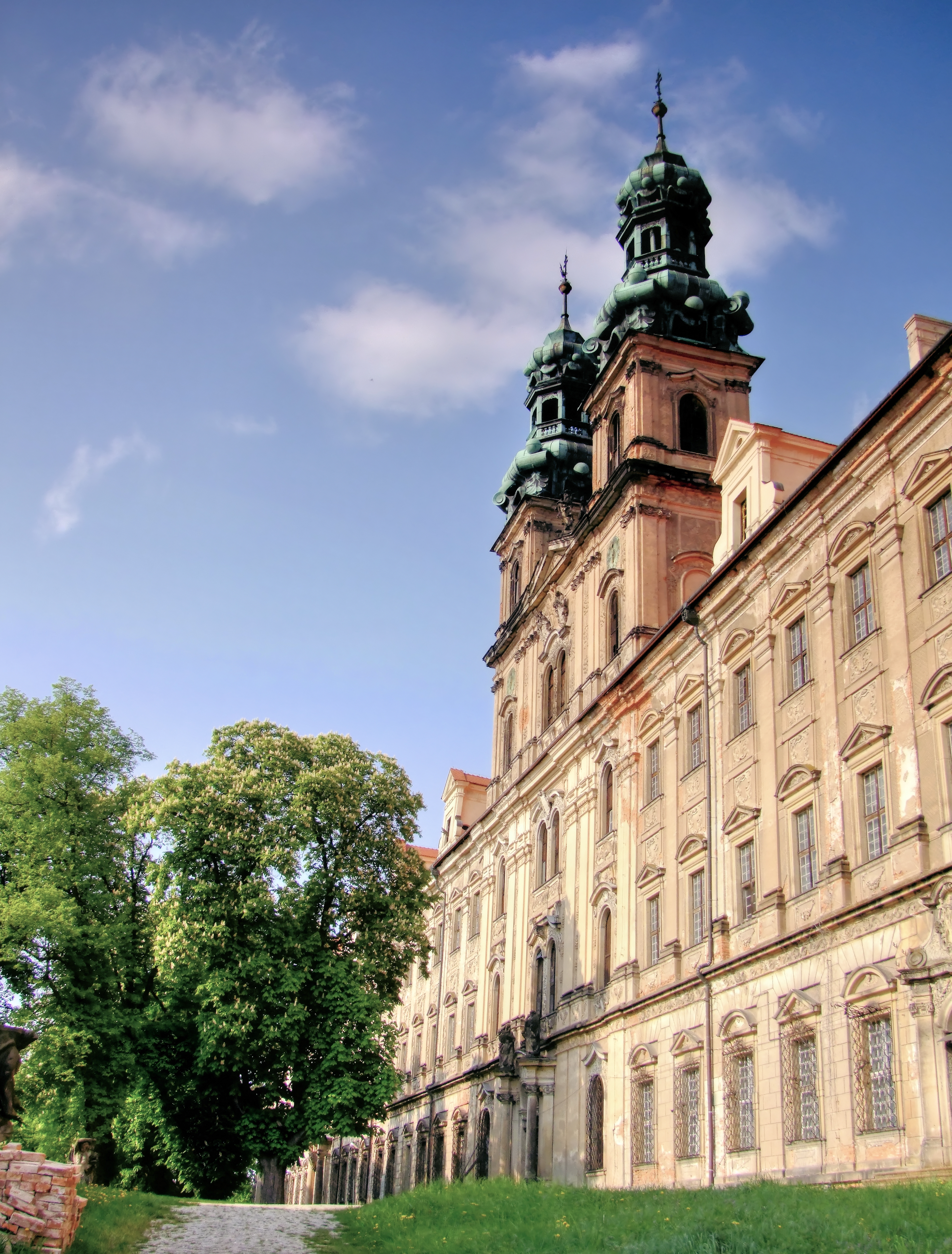 Lubiąż, Pl. Klasztorny - zespół klasztorny cystersów: (zabytek nr A/2755/616/W z 10-05.1988)